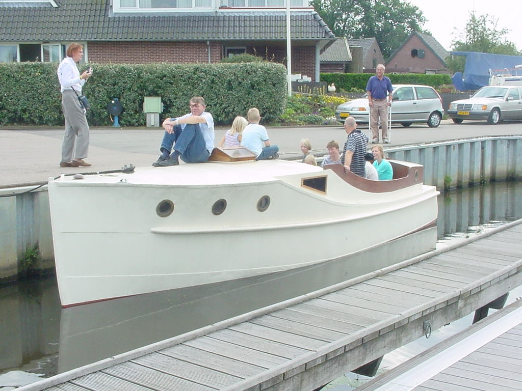 Foto genomen na de 1e tewaterlating (met mij als eigenaar) van de Pelikaan in oktober 2006